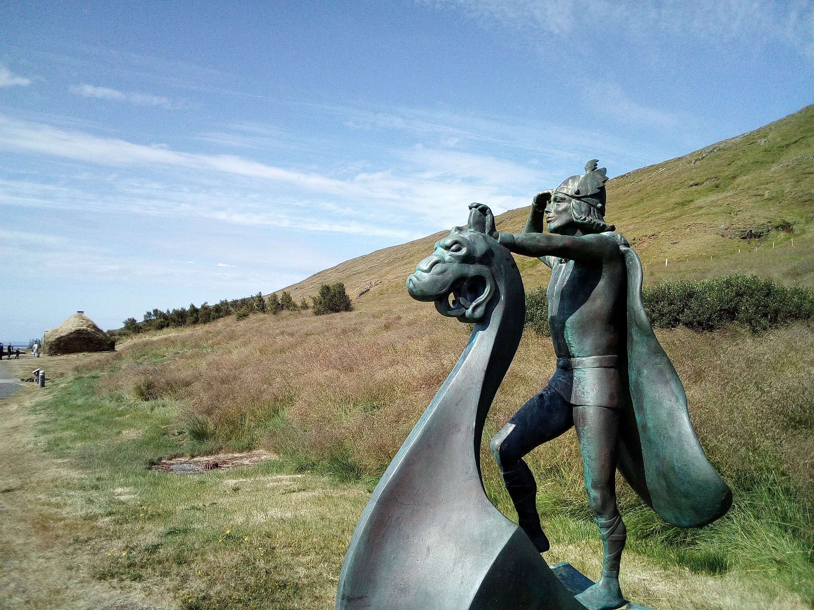 Eiríksstaðir